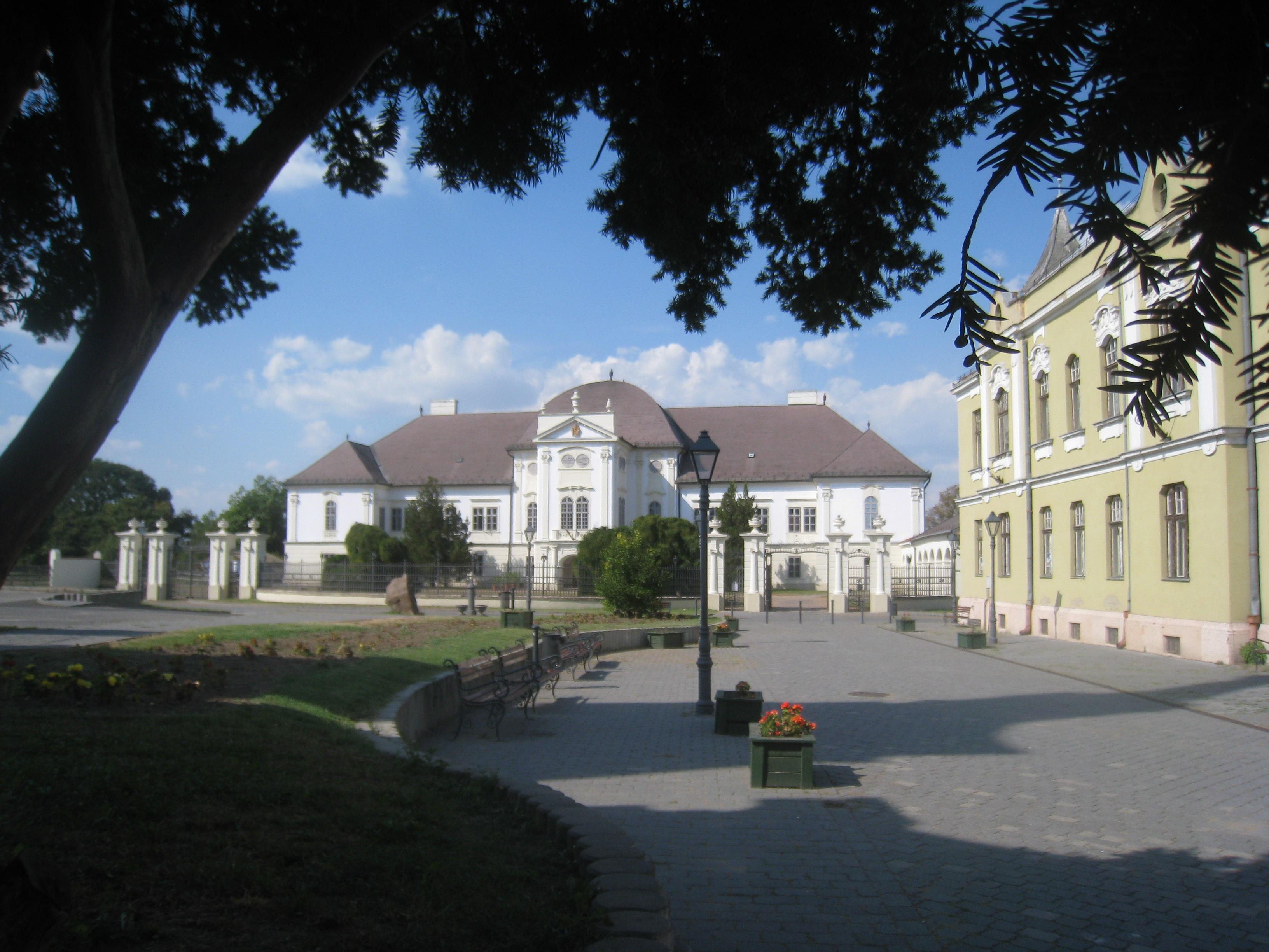 Forgách-kastély This is a photo of a monument in Hungary. Identifier: 6807